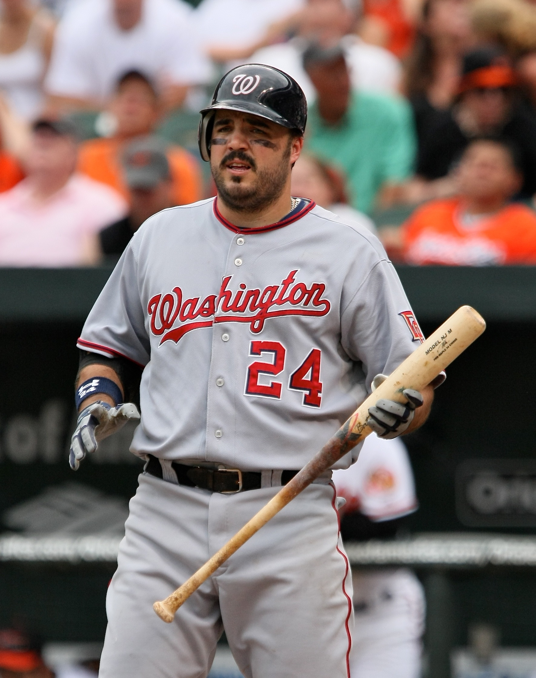 Nick Johnson